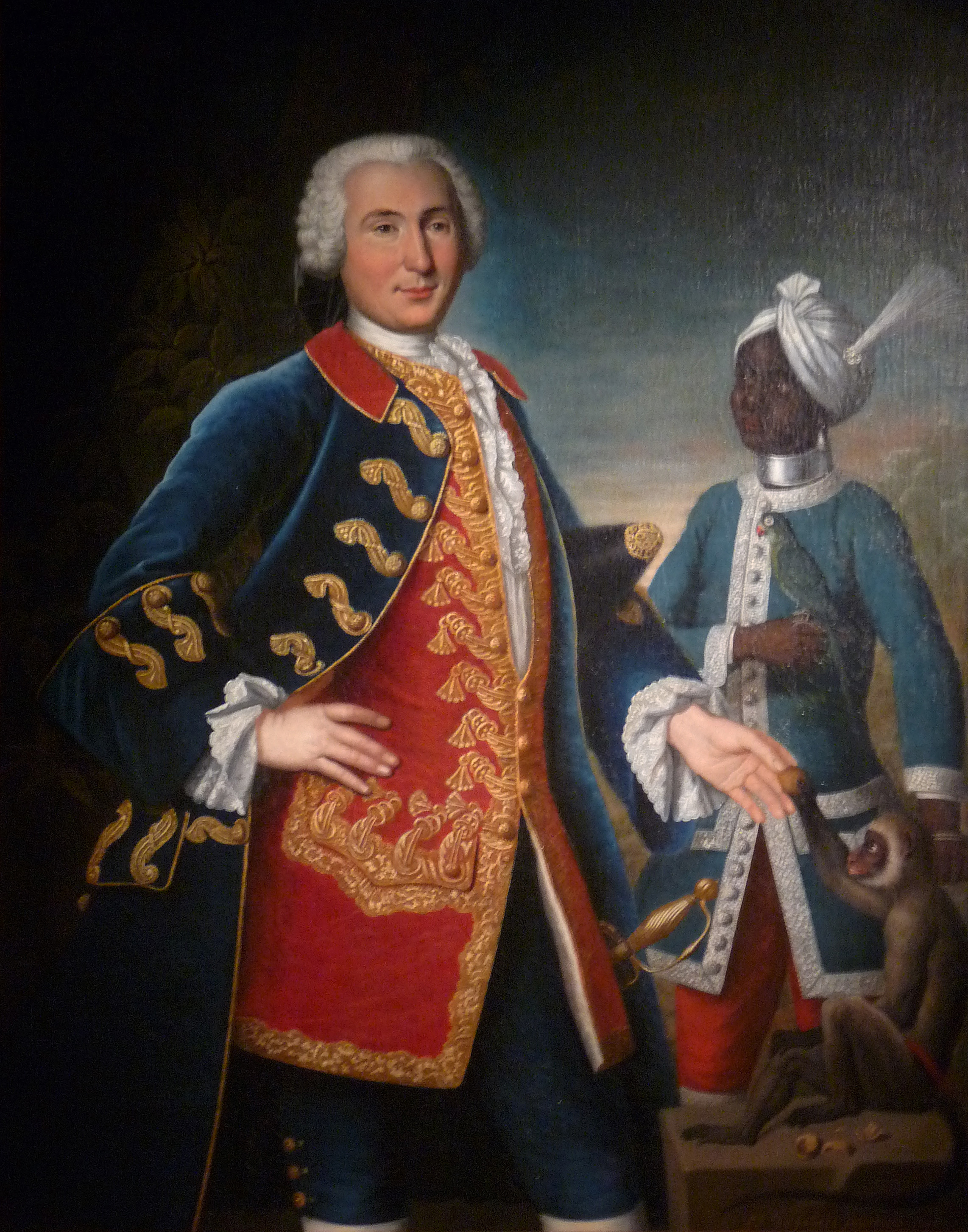 Portrait d'Antoine Barthélemy de Vire Duliron de Montivers, capitaine d’infanterie au service de la Compagnie des Indes